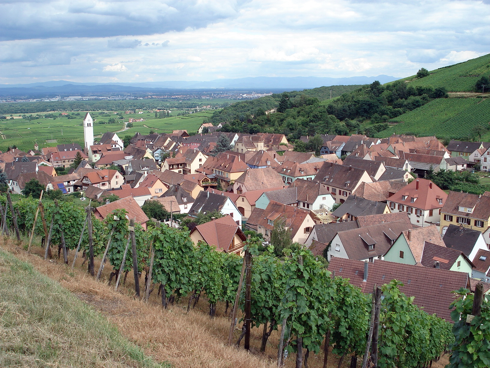 Katzenthal, Haut-Rhin, Alsace, France. À l'arrière-plan, la plaine d'Alsace, où s'étire l'agglomération de Colmar (Z.I. Nord à gauche, ville à droite, en partie cachée par la colline). Dans le lointain, à gauche, monts de la Forêt Noire, à droite (au profil moins net) les Alpes bernoises.